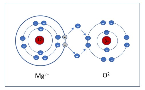 Magnesiumioni ja oksidi-ioni